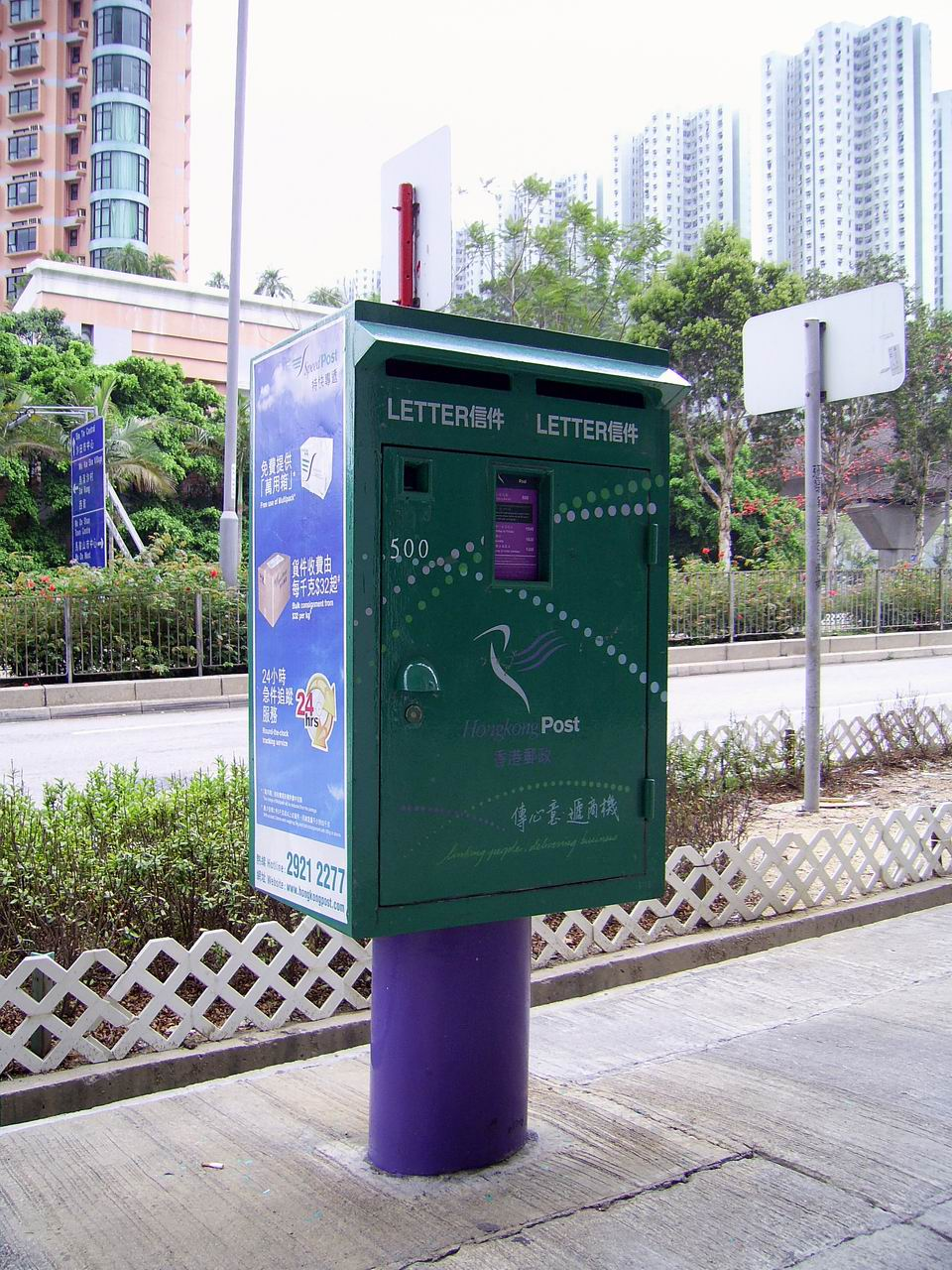 香港郵政郵箱